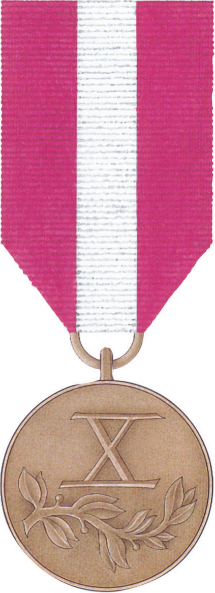 Brązowy Medal za Długoletnią Służbę. Rewers.